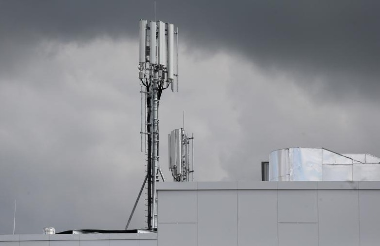 Slika odašiljača